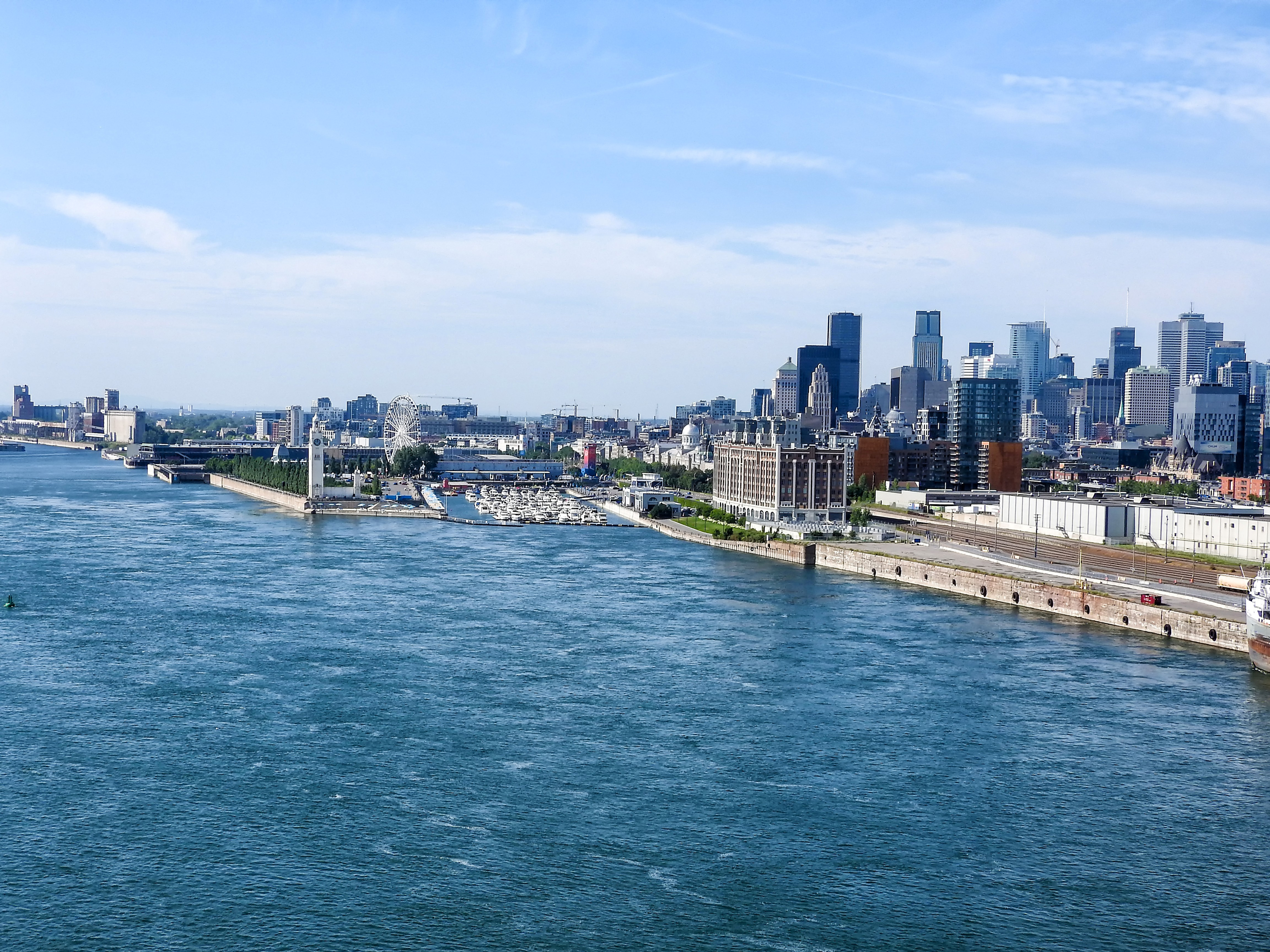 Montréal 302